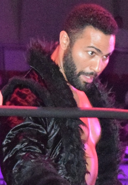 2015年9月27日 ワールド記念ホール「DESTRUCTION in KOBE」 ロッキー・ロメロ